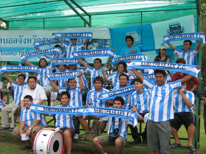 Samut Prakan FC fan